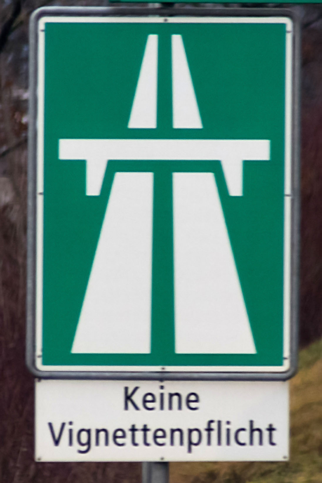 Autobahn mit Zusatztafel "Keine Vignettenpflicht", Hauptstrasse 5 (Aarau-Hunzenschwil)